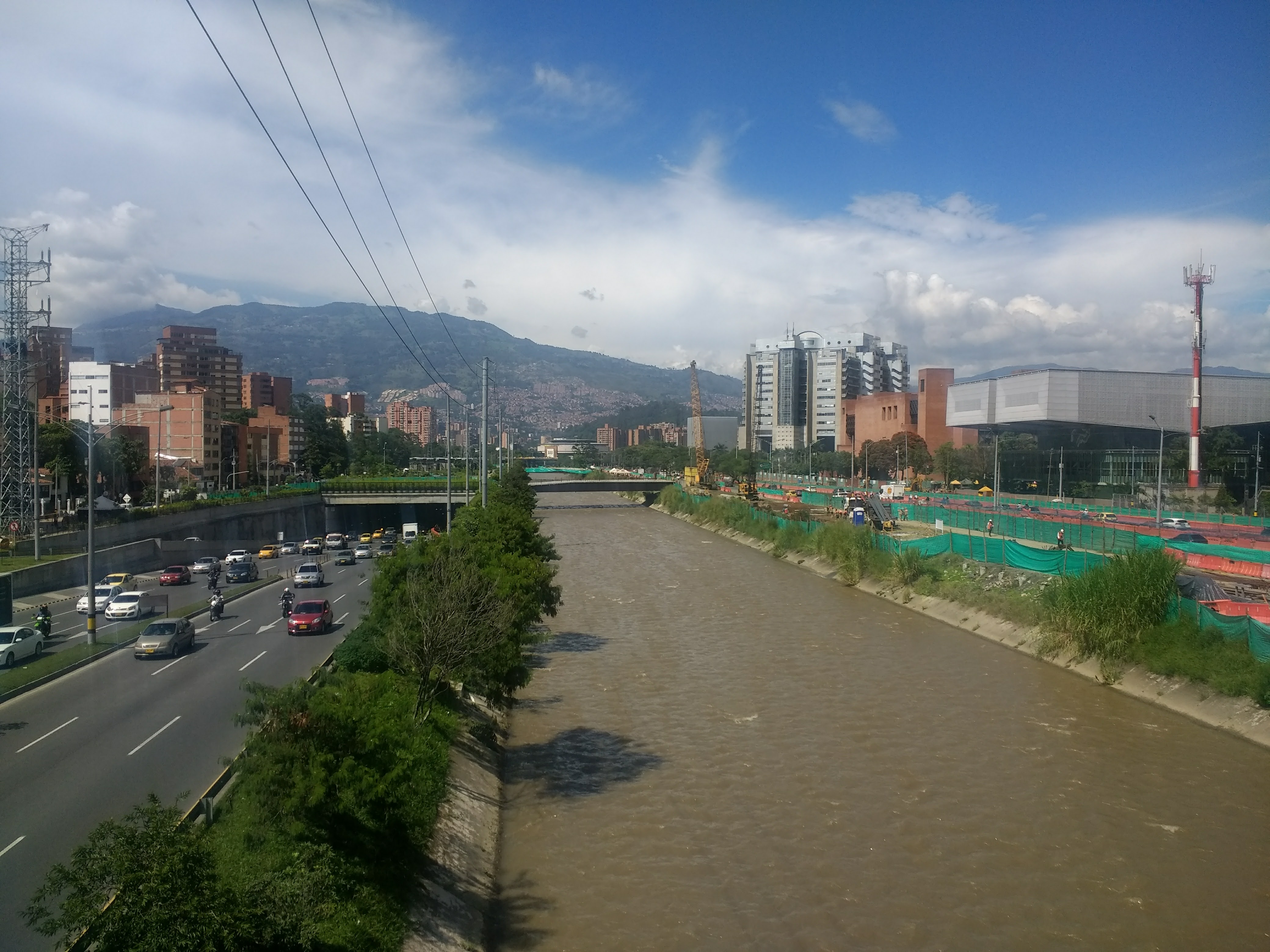 Vista del río Medellín hacia el norte desde el puente que lo cruza a la altura de la Avenida 33, en noviembre de 2017. Se aprecian el soterrado de la Avenida Regional al occidente (izquierda de la imagen) y las obras de Parques del Río (oriente, a la derecha)